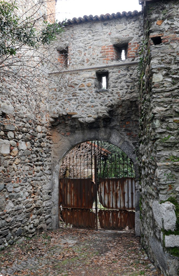 La porta risale al 1324, anno in cui i fratelli Grassi avevano fortificato il borgo canturino con le numerose torri e le invincibili mura per difendere la propria indipendenza contro Milano.